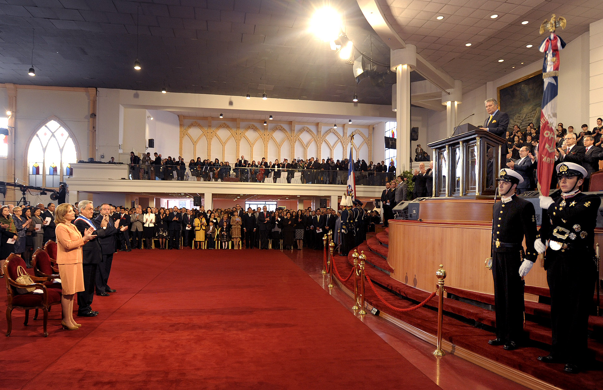 16-09-2012 Te Deum Evangélico